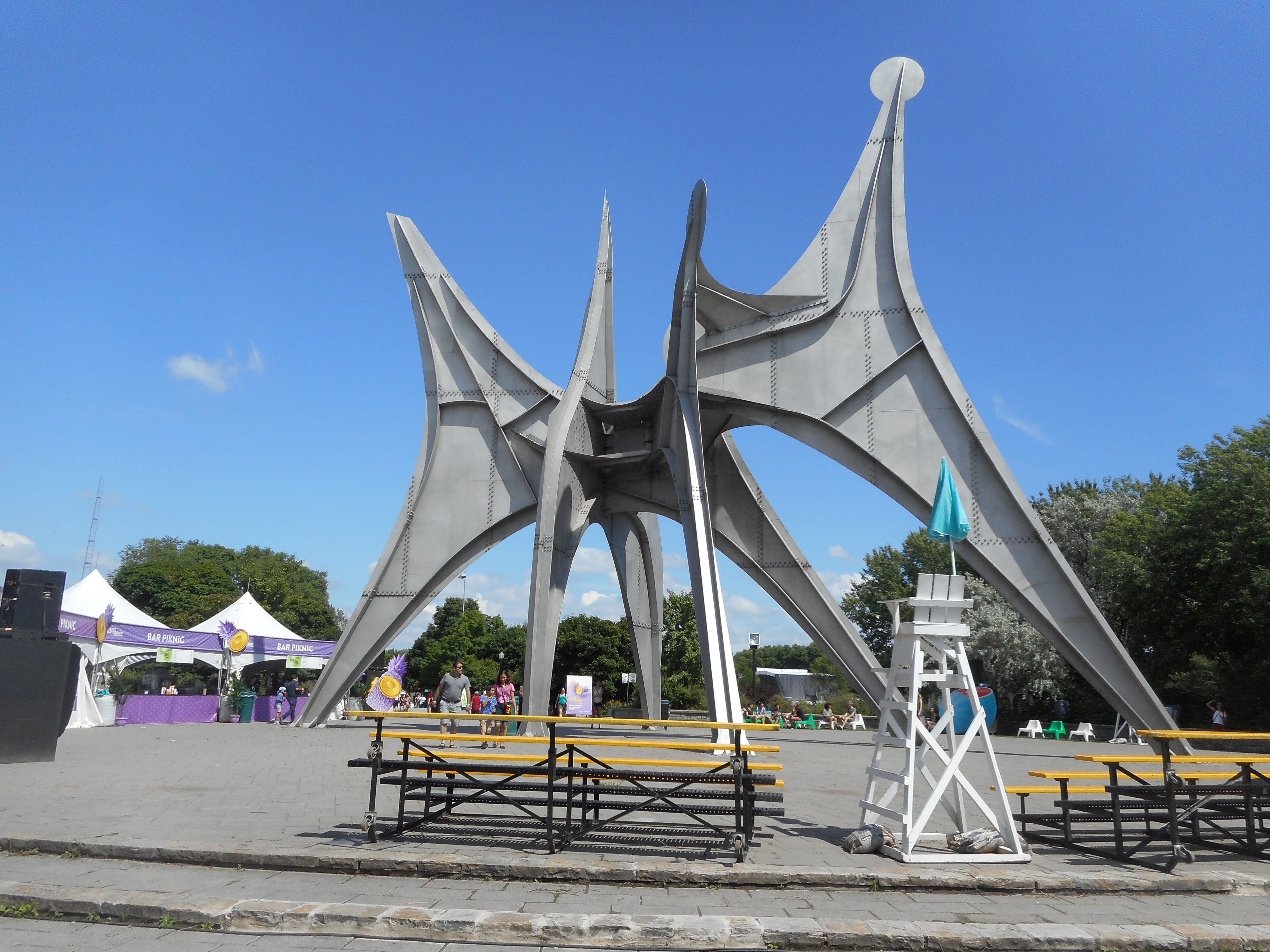 Piknic Électronik, installé autour de la sculpture de Calder intitulée L'Homme, île Sainte-Hélène, parc Jean-Drapeau, Montréal